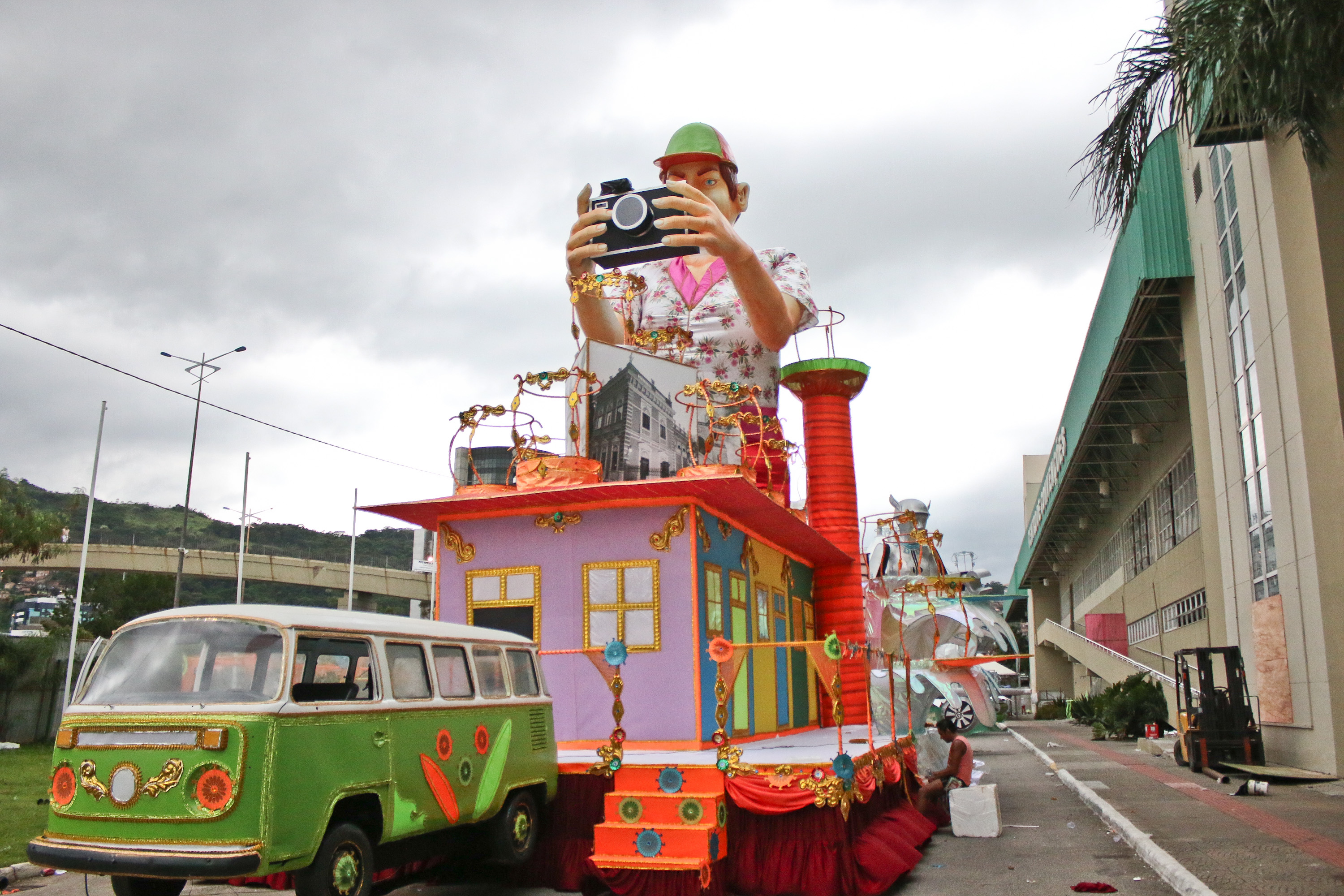 Alegoria de escola de Samba aguardando o desfile em 2015.